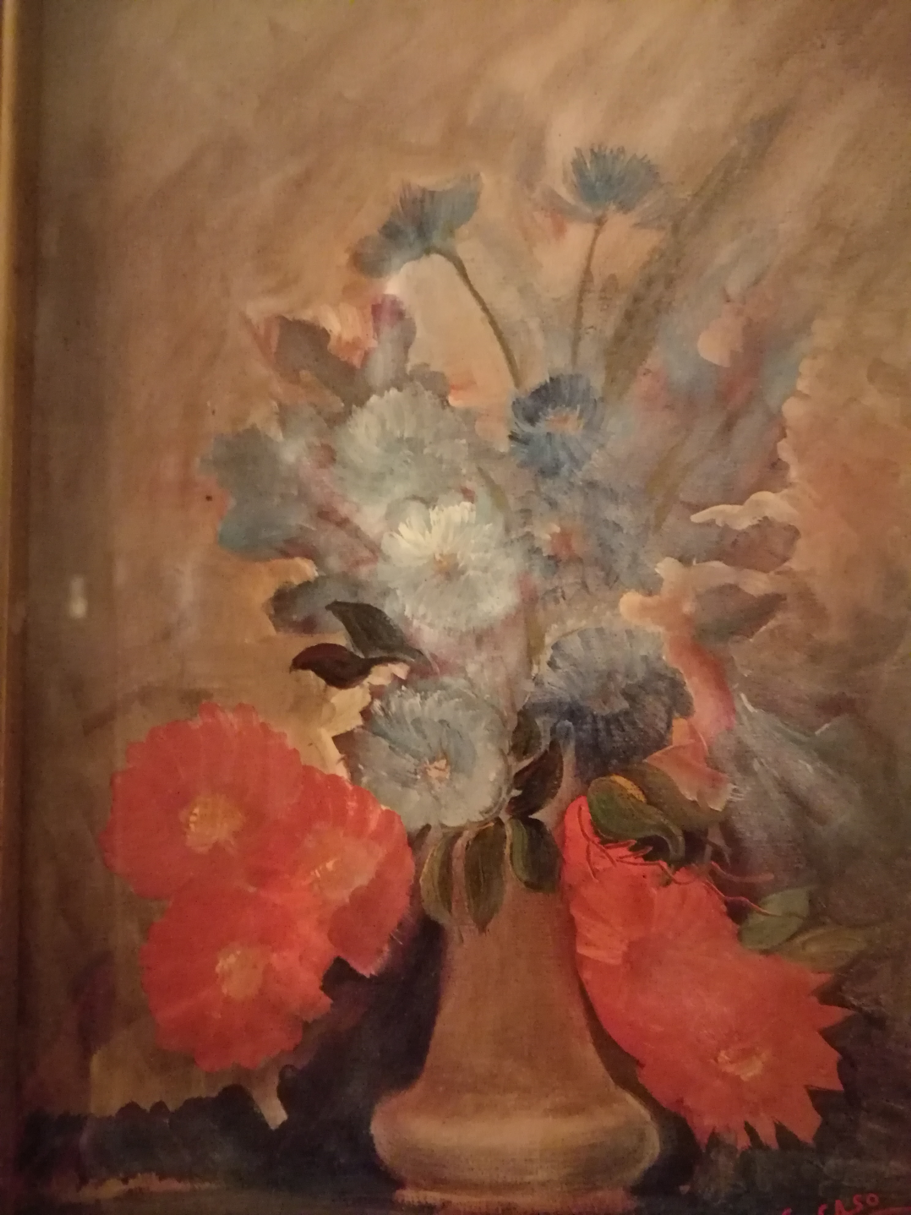 Olio su tela